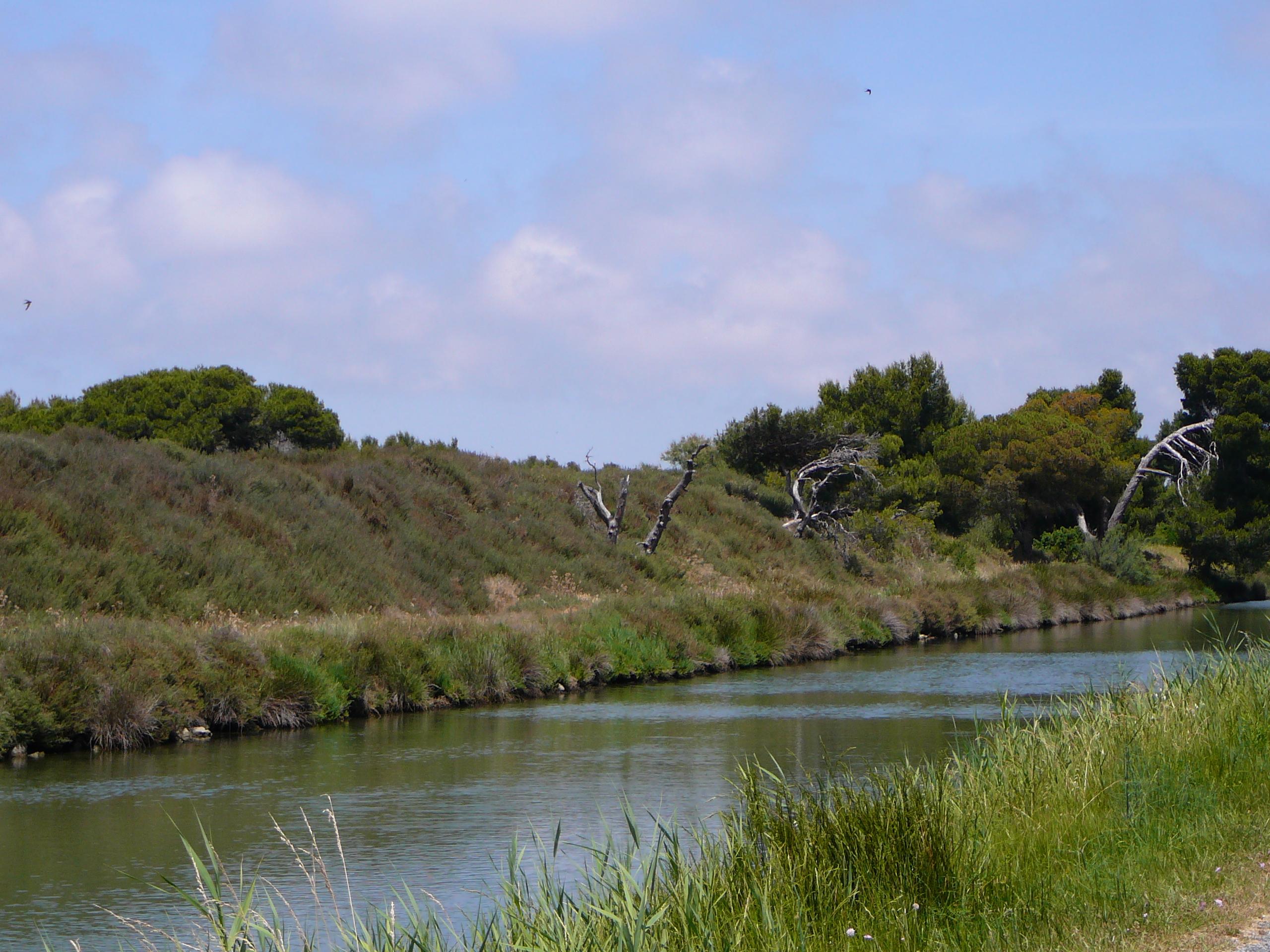 Le canal de la Robine vers l'ûle de Sainte-Lucie à Port-la-Nouvelle (photo personnelle de Joyce11)